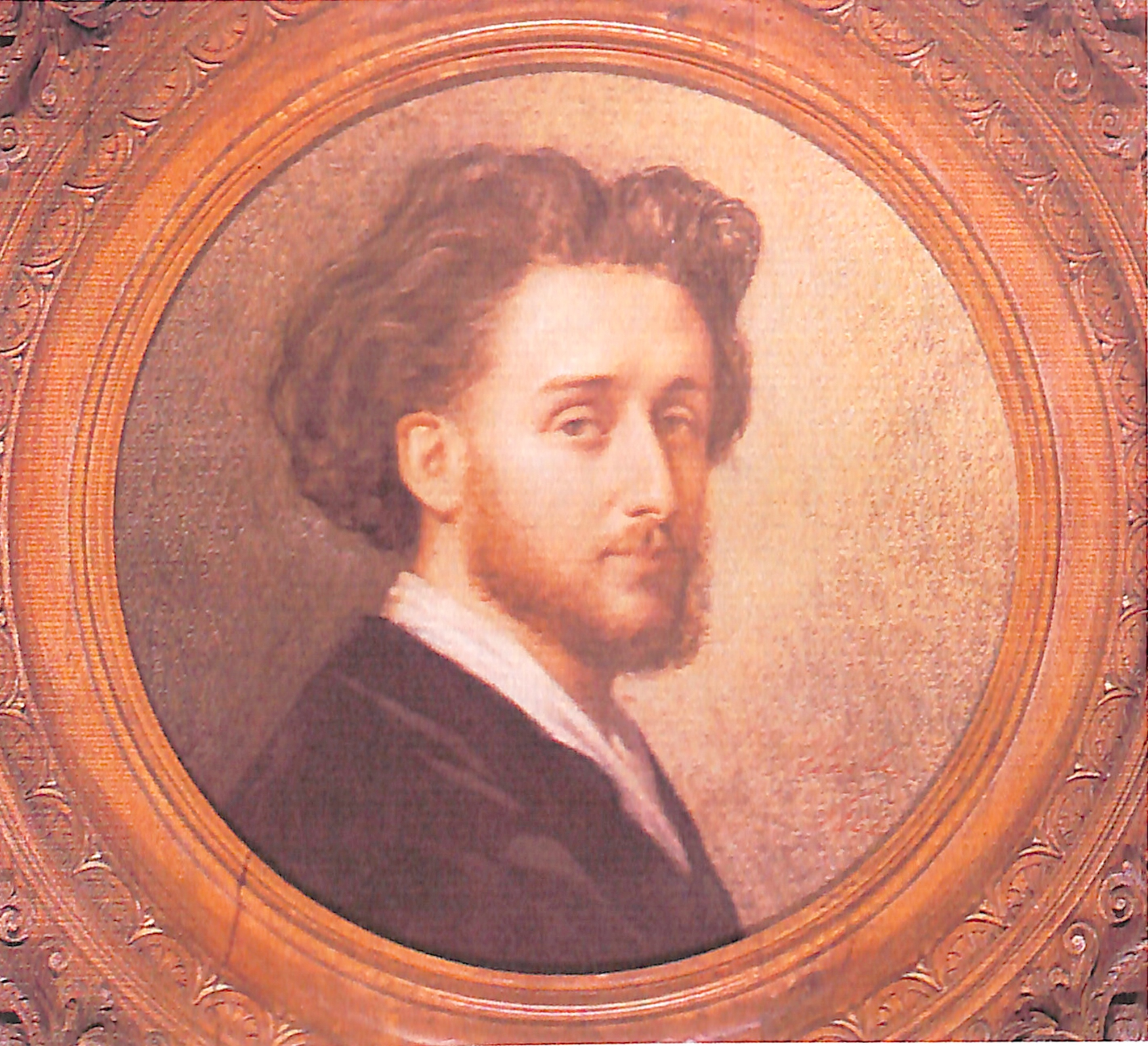 Pastel anonyme de Gianmartino Arconati-Visconti, datée de 1864, exposé au château de Gaasbeck